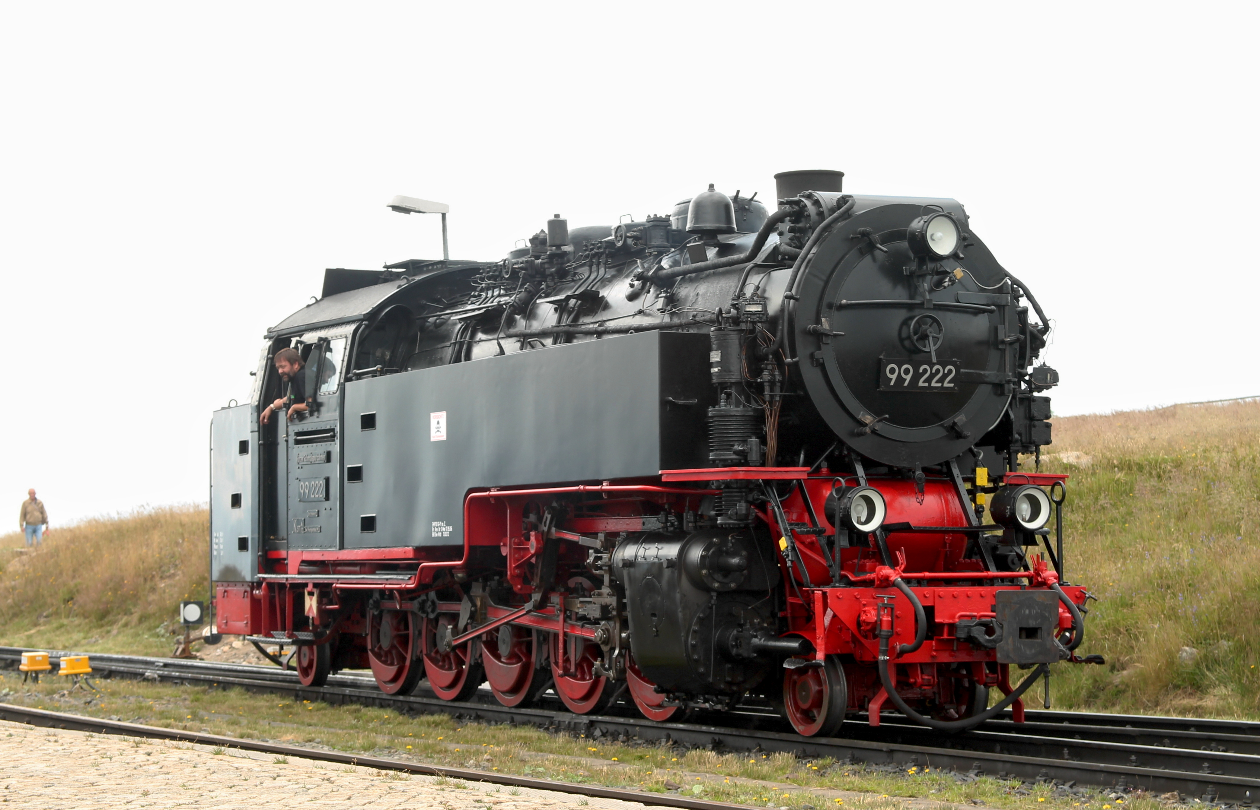 Dampflokomotive 99 222 der HSB ex 99 7222 der DR ex 99 222 der DR/DRB/DRG (Schwartzkopff 9921/1931, 1’E1’h2t) auf dem Brocken am 03. August 2012